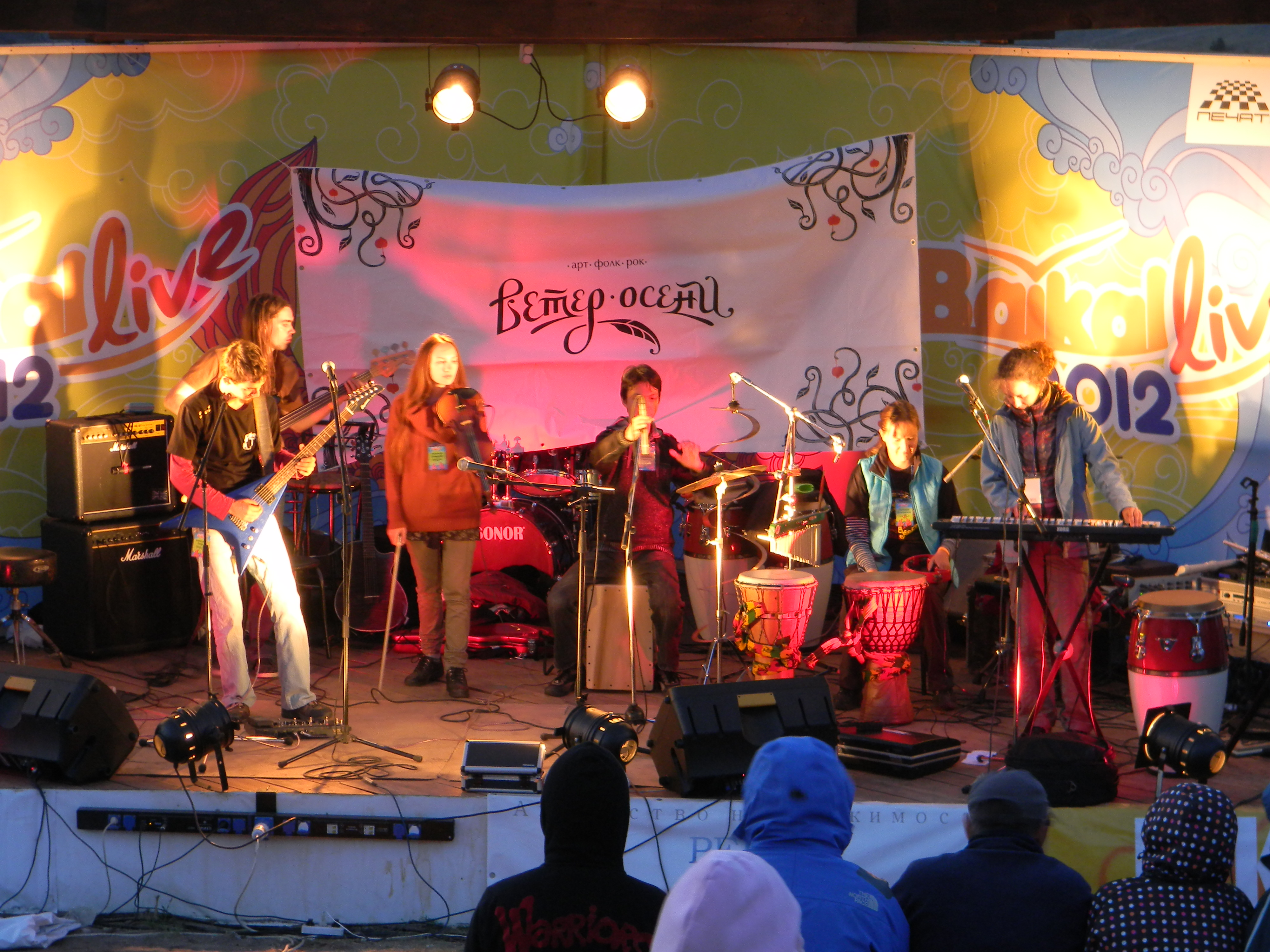 Группа «Ветер Осени» (г. Иркутск) на сцене летнего фестиваля Baikal-live